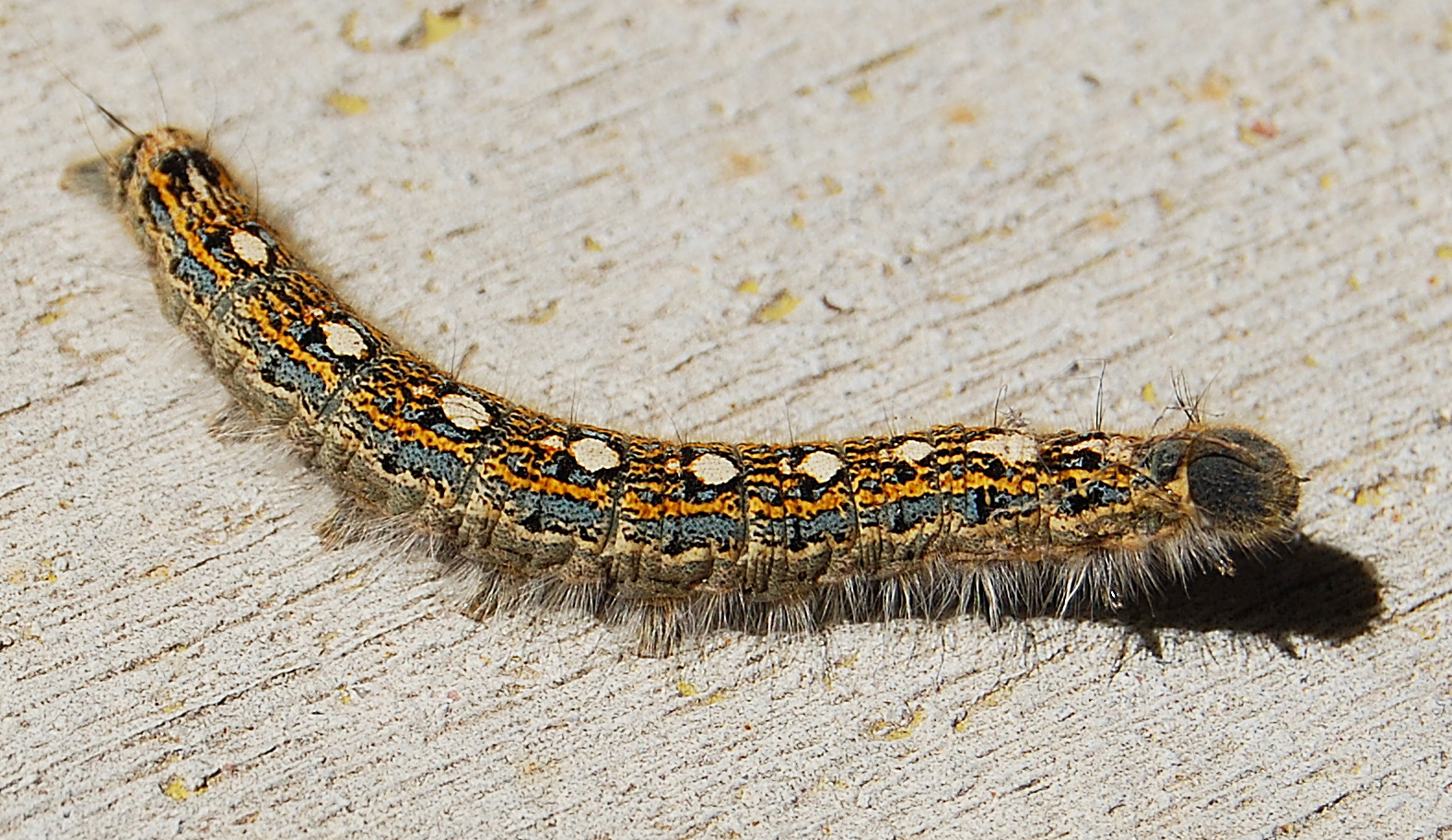 Forest Tent Caterpillar - Malacosoma disstria